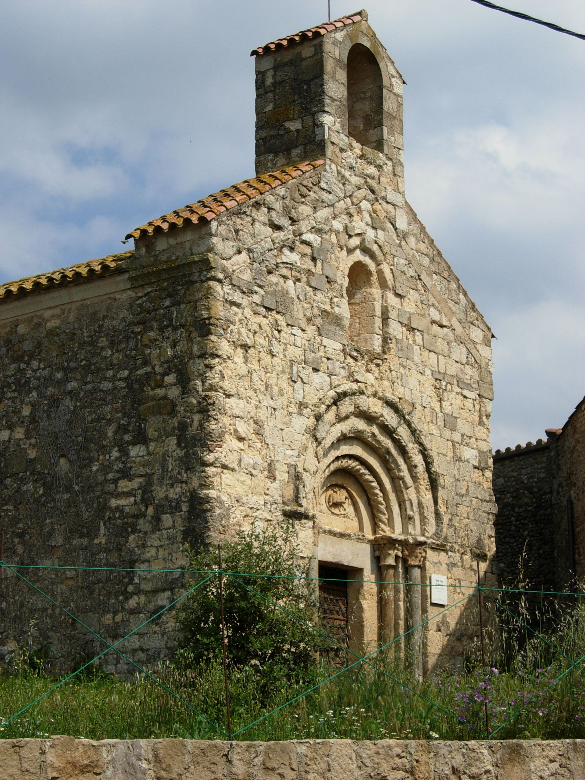 façada de l'esglèsia vella de can Miró